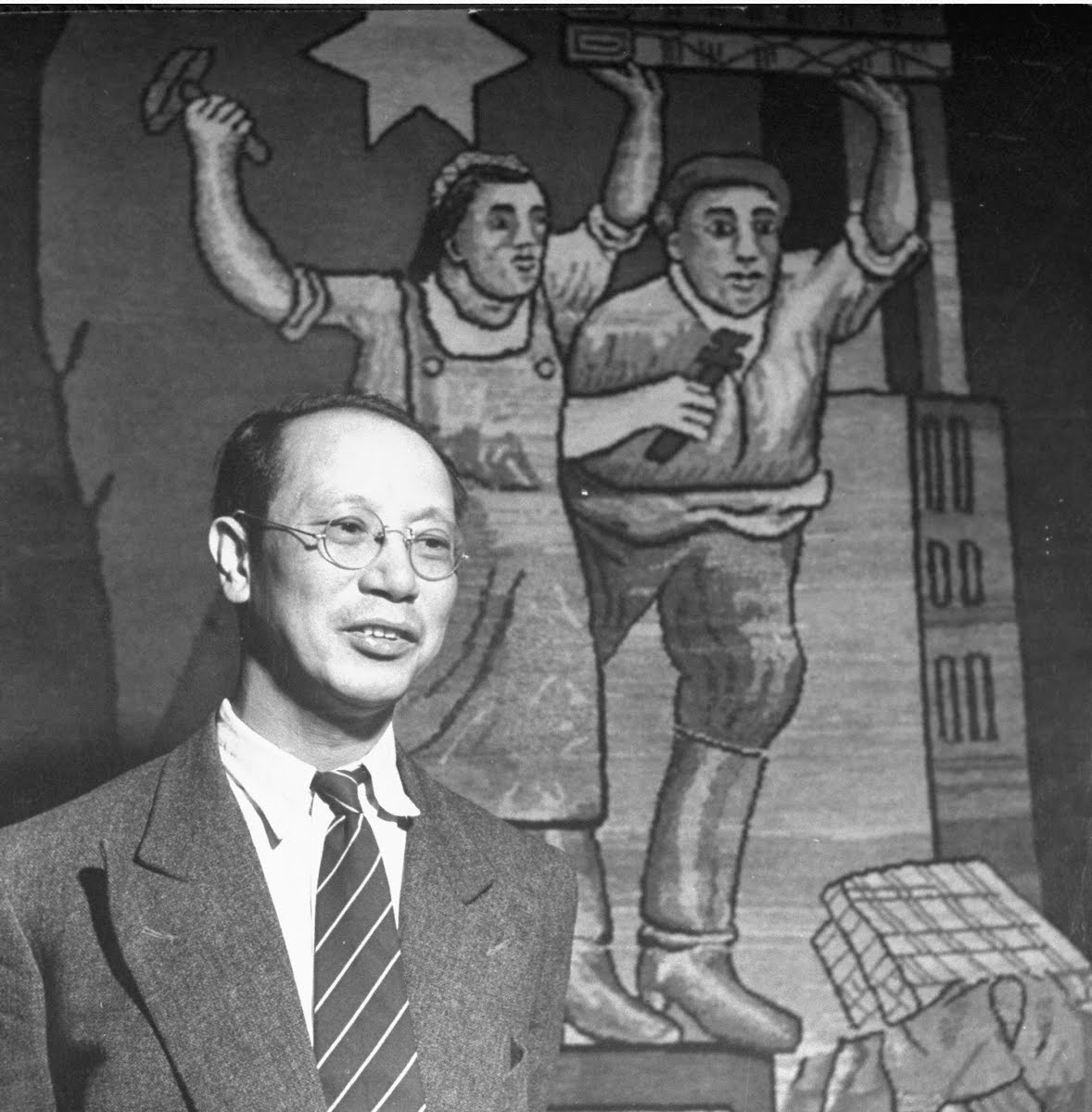 林继庸职新疆建设厅长时所摄